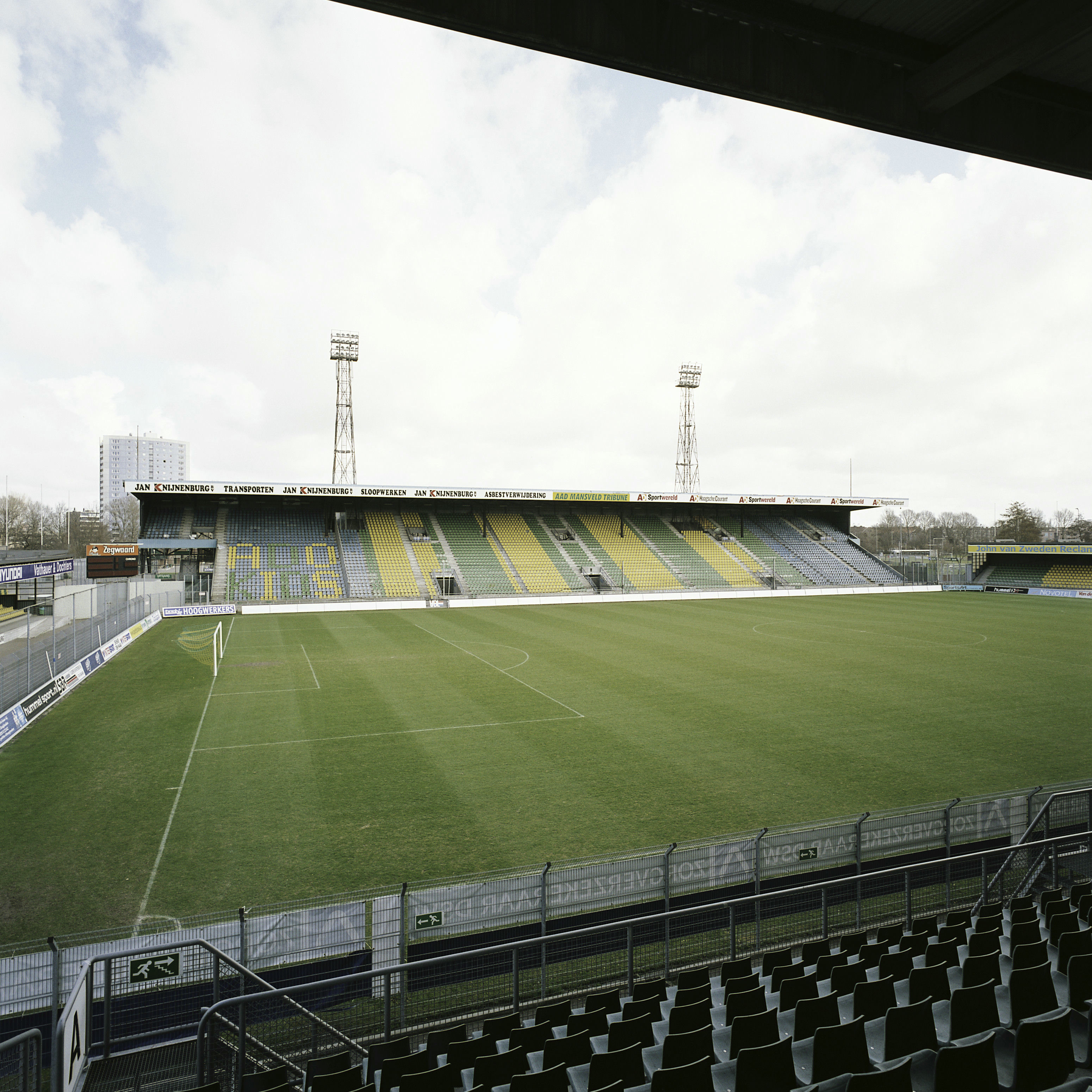 Zuiderparkstadion: Overzicht interieur stadion met zicht op de zuidtribune